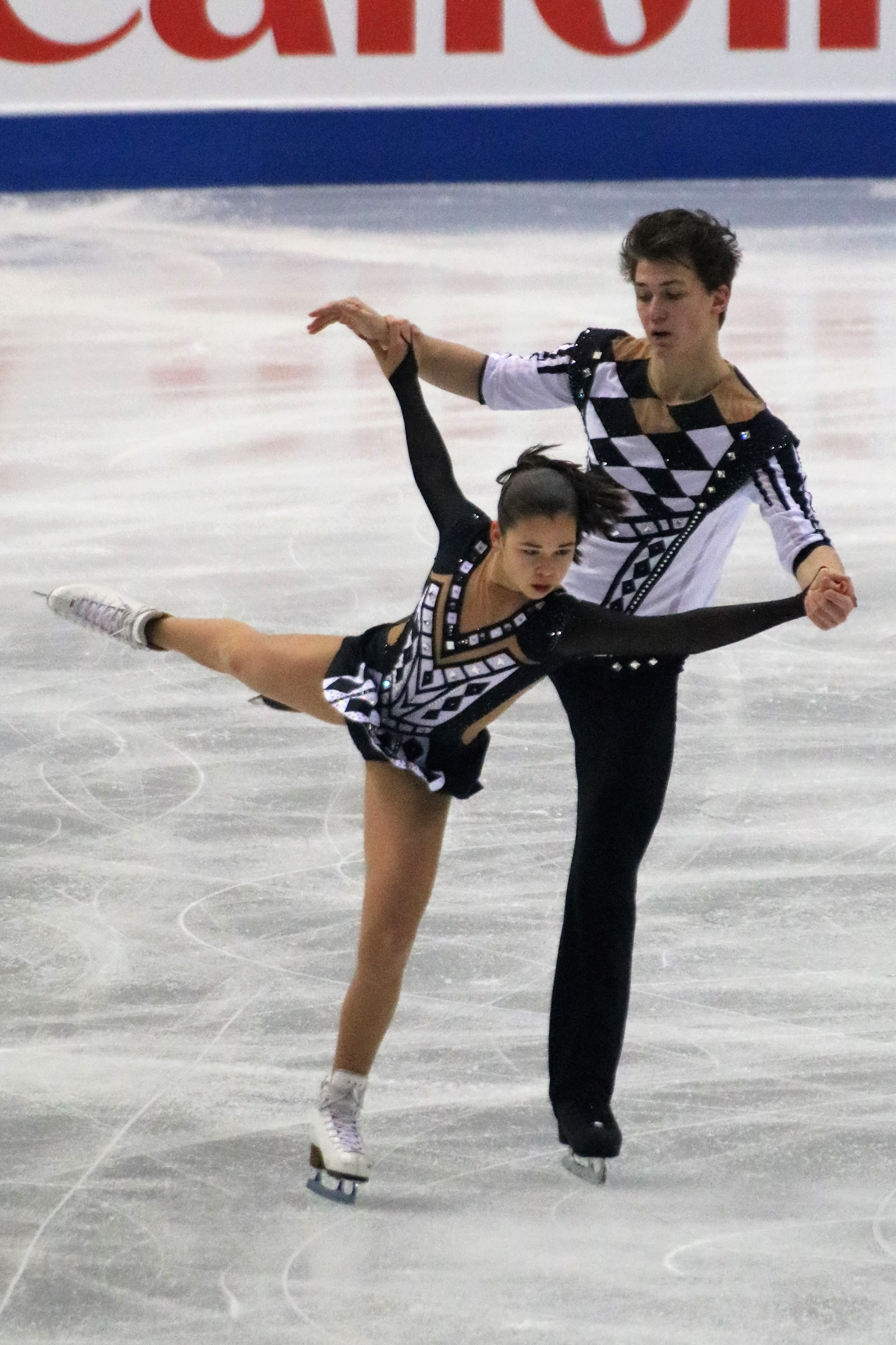 Диана Мухаметзянова / Илья Миронов (Россия) на финале юниорского Гран-при 2019-2020